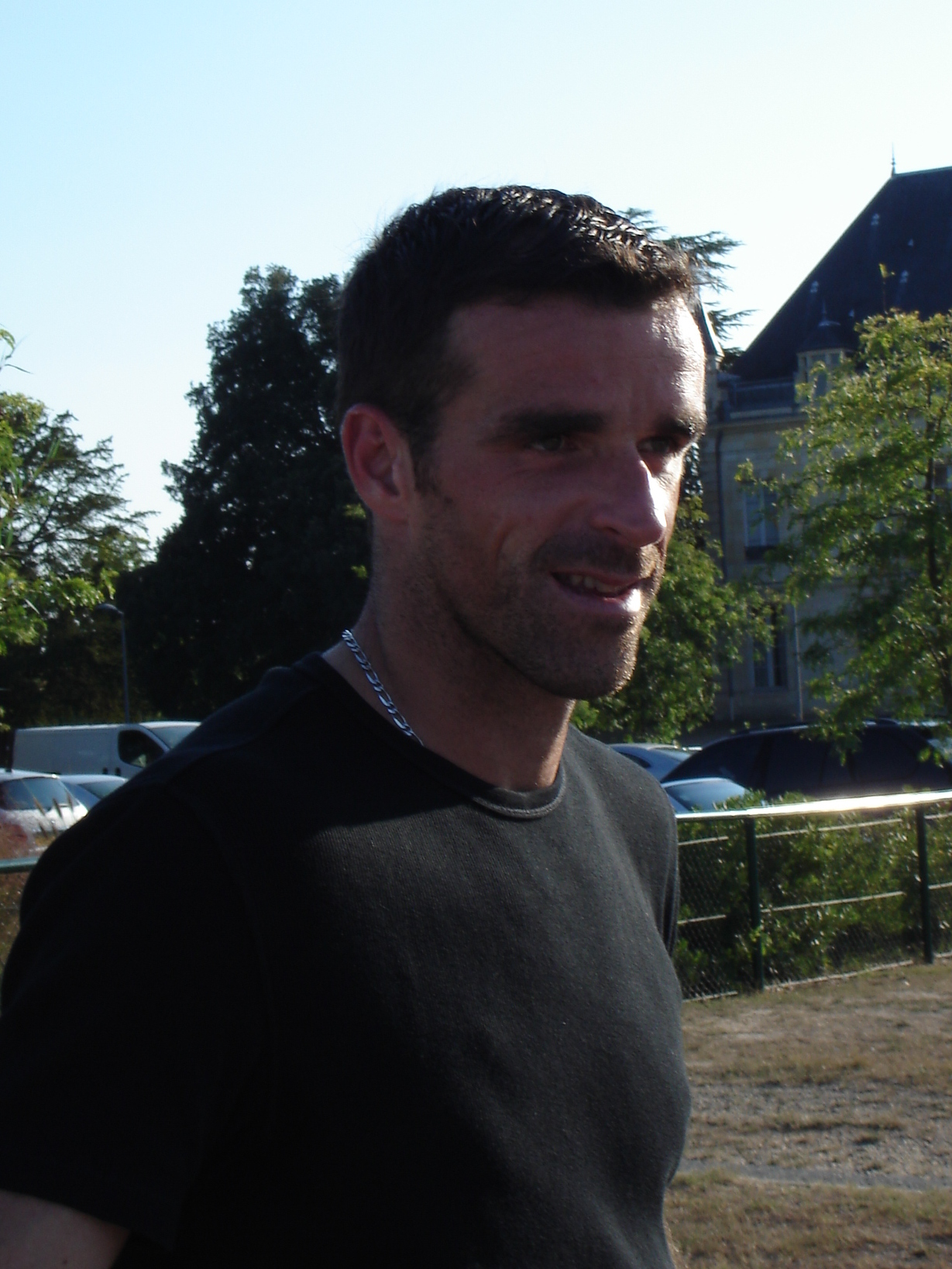 Ulrich Ramé gardien de but des Girondins de Bordeaux